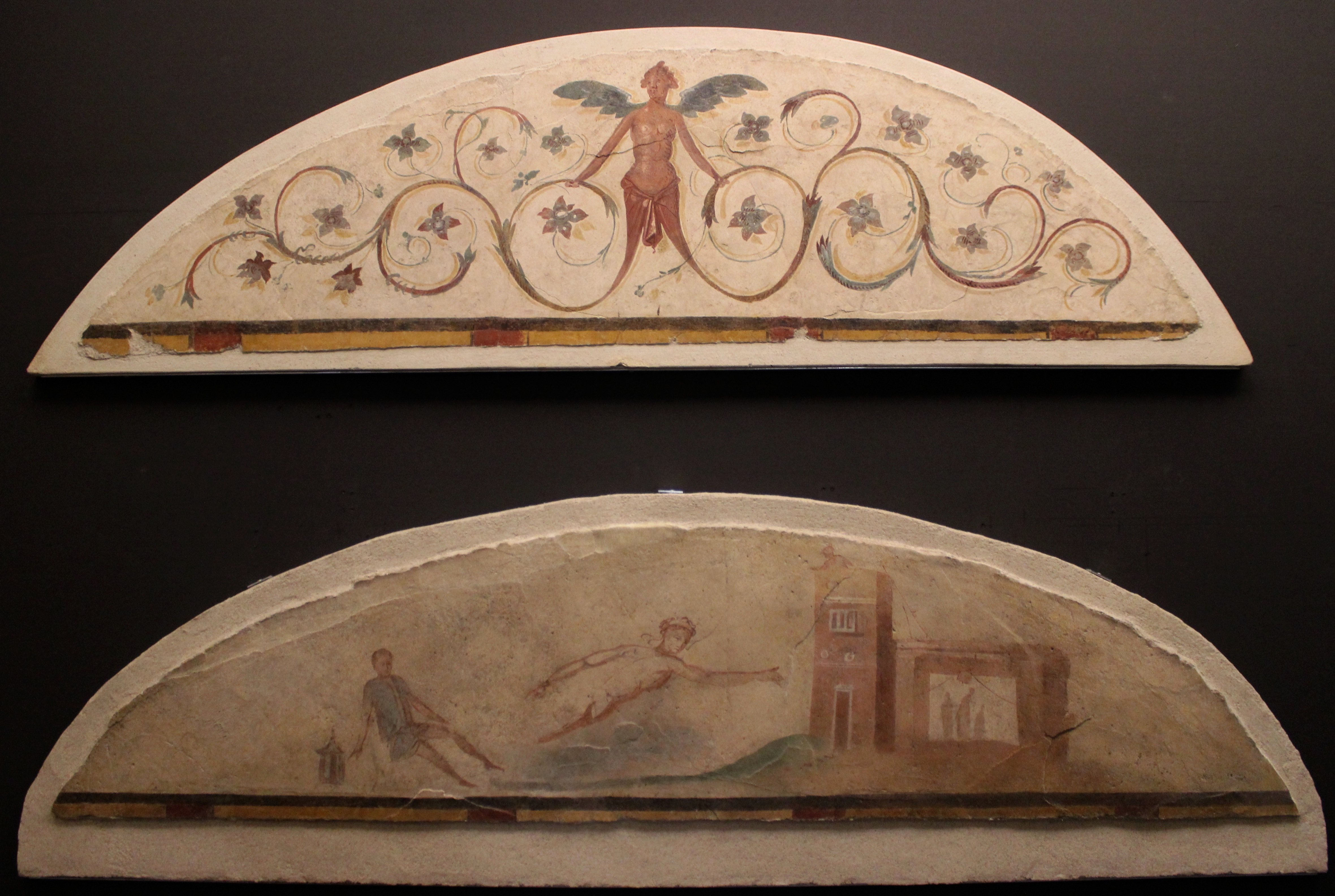 Frescos de la Tumba de Morlupo. Roma, Palazzo Massimo alle Terme.